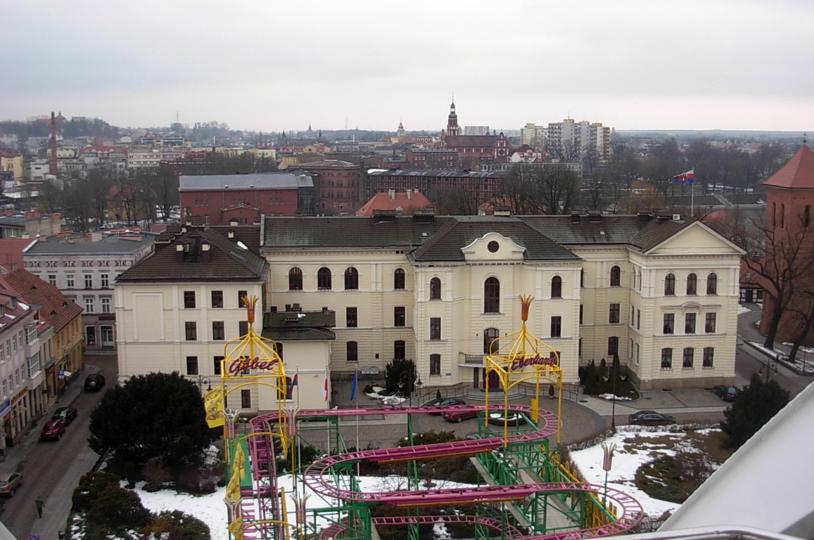 Stare Miasto w Bydgoszczy, ratusz - dawne kolegium jezuickie